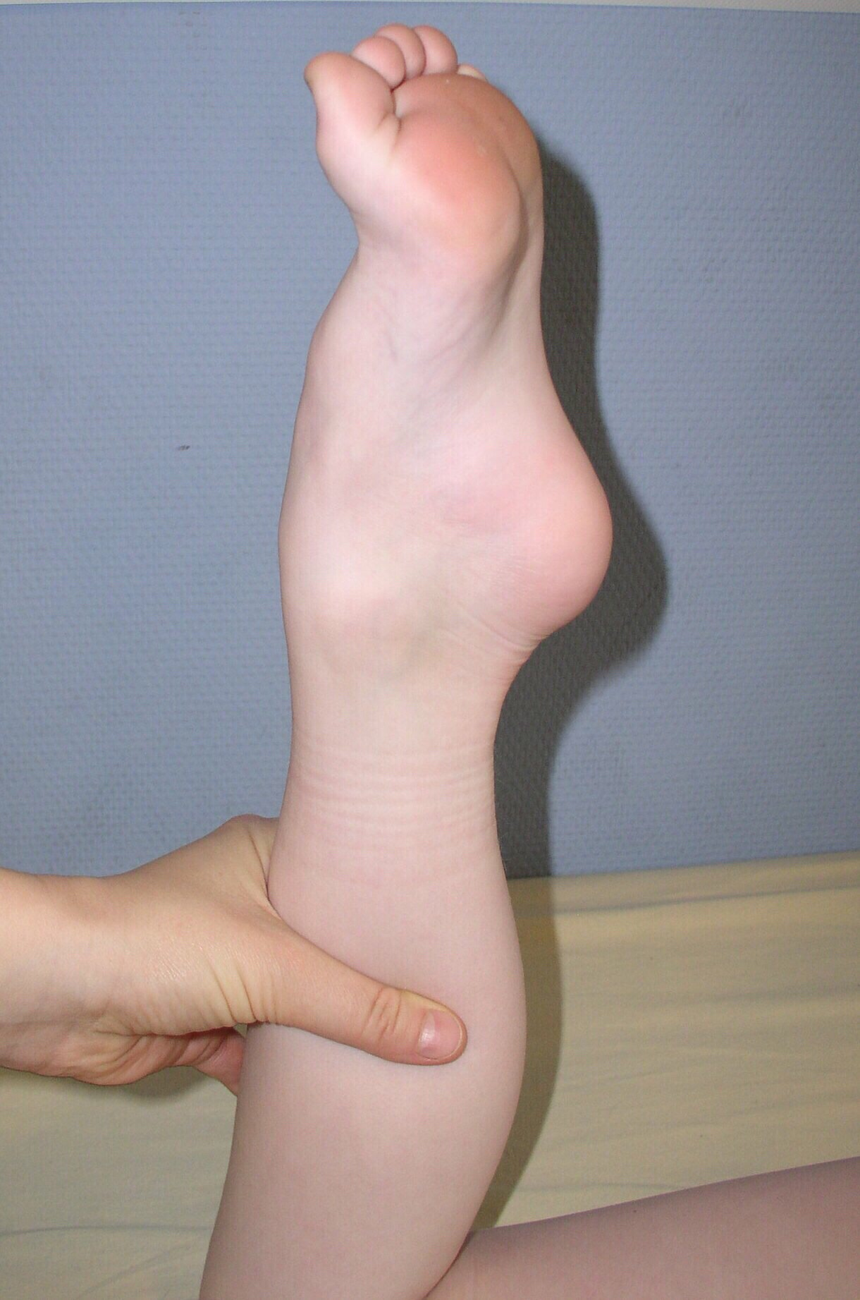 Beispiel für einen deformierten Fuß nach unbehandeltem Zehenspitzengang